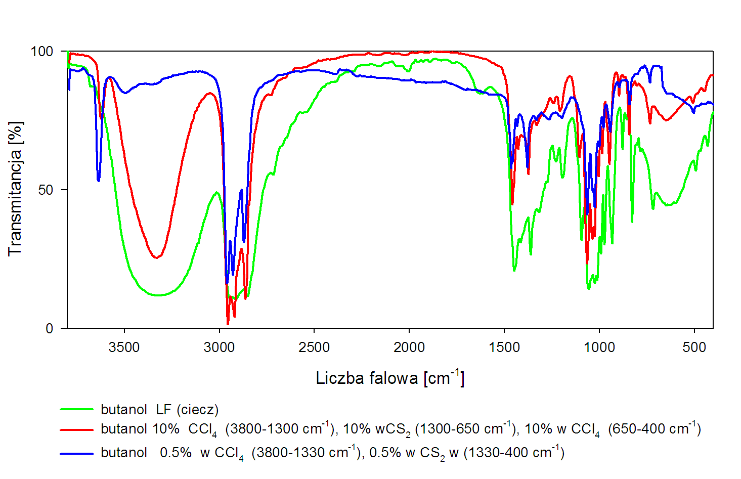 IR spectrum